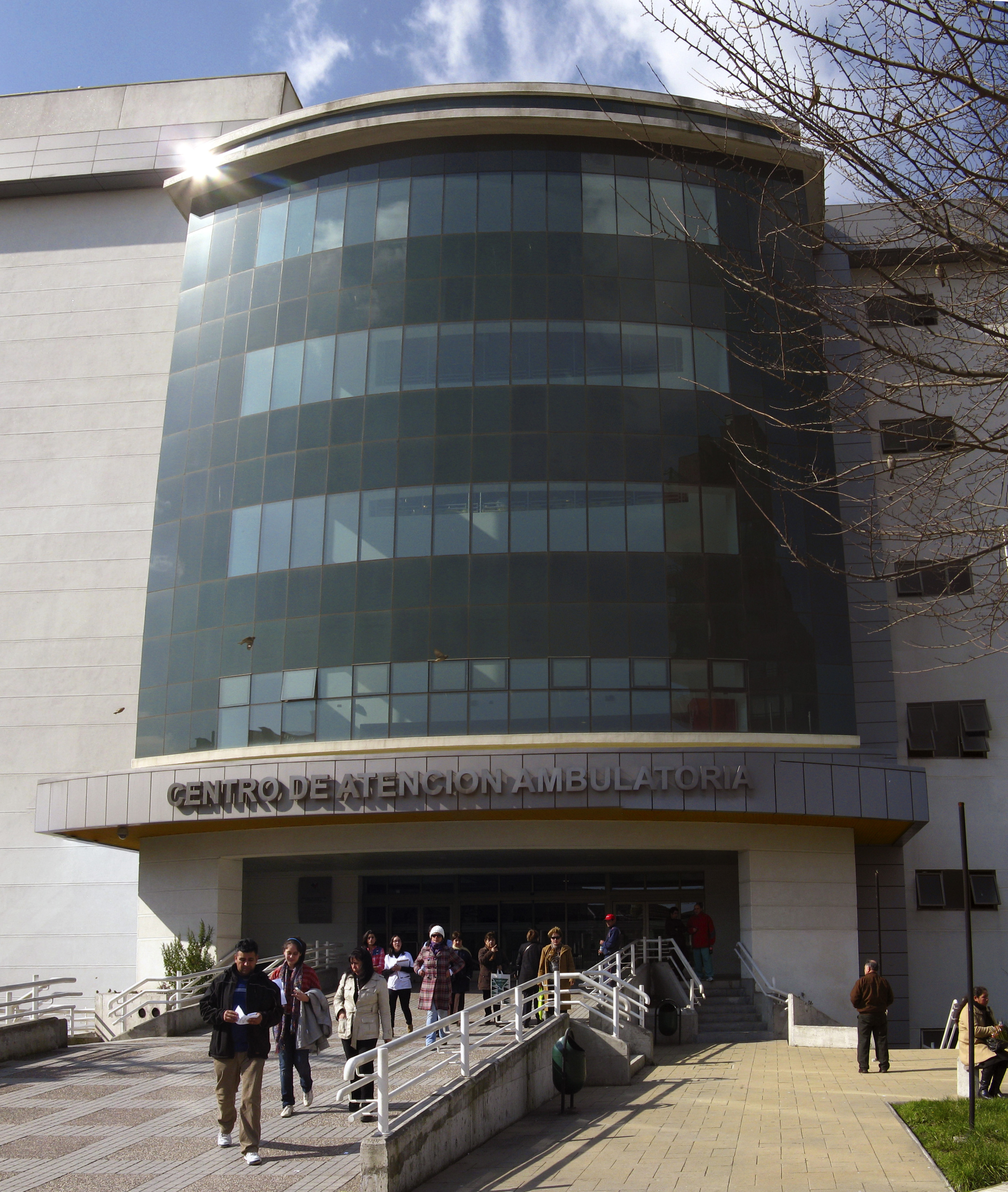 "Hospital Regional de Concepción", cuyo nombre completo es "Hospital Clínico Regional Doctor Guillermo Grant Benavente de Concepción" Concepción, Chile Agosto de 2012